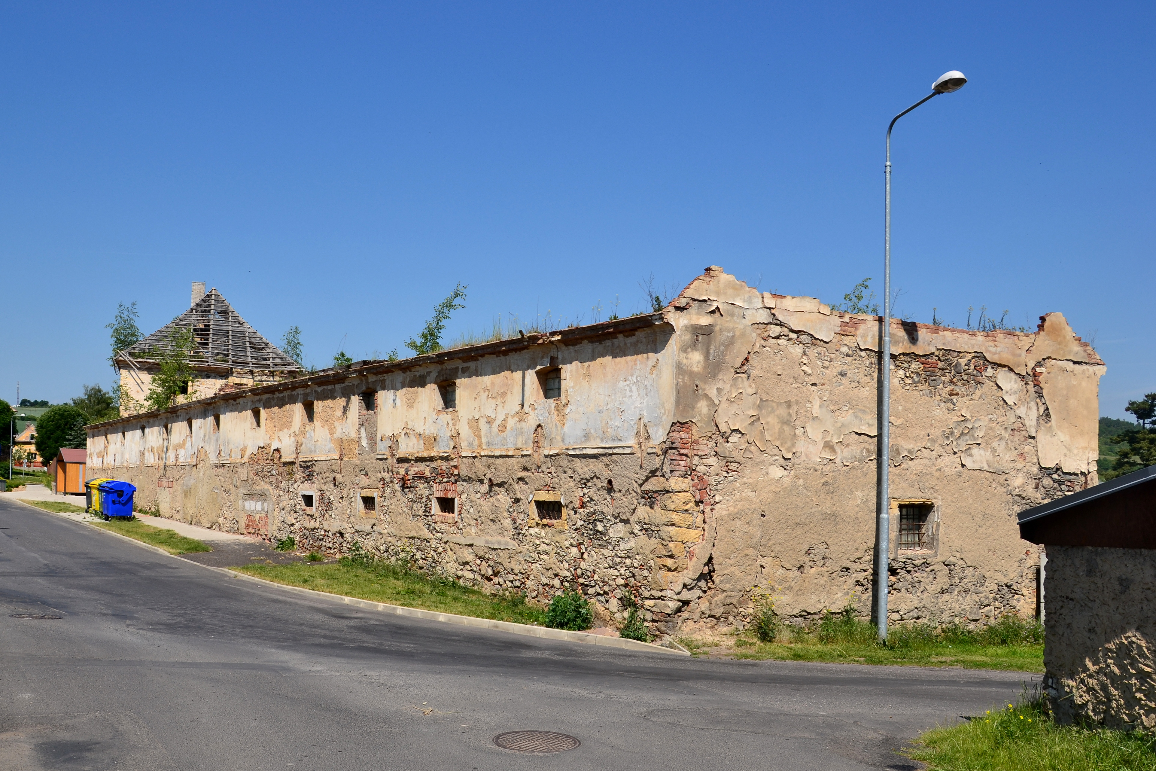 Hospodářská budova východně od zámku